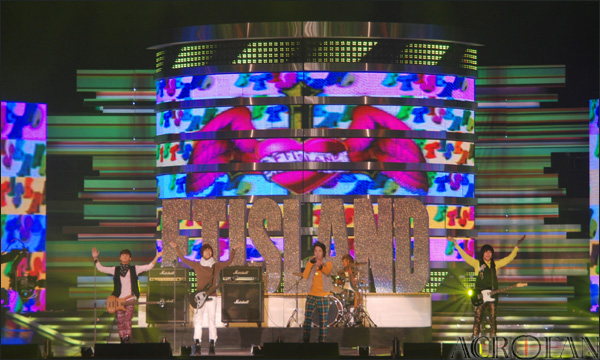 농심 협찬 제9회 '2008 사랑나눔콘서트'